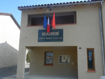 Mairie-gensac-sur-Garonne façade de la mairie